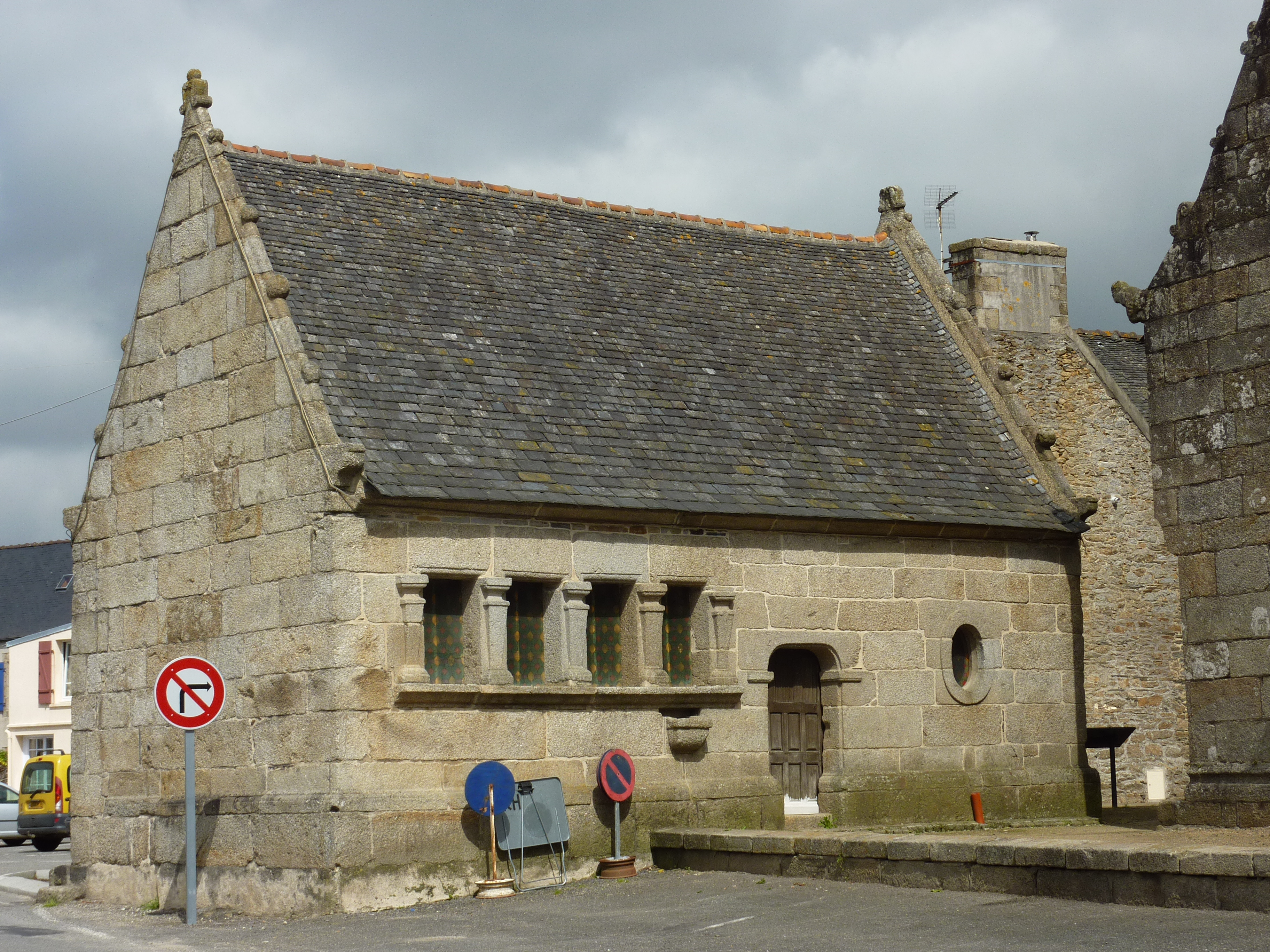 Pleyber-Christ: l'ossuaire